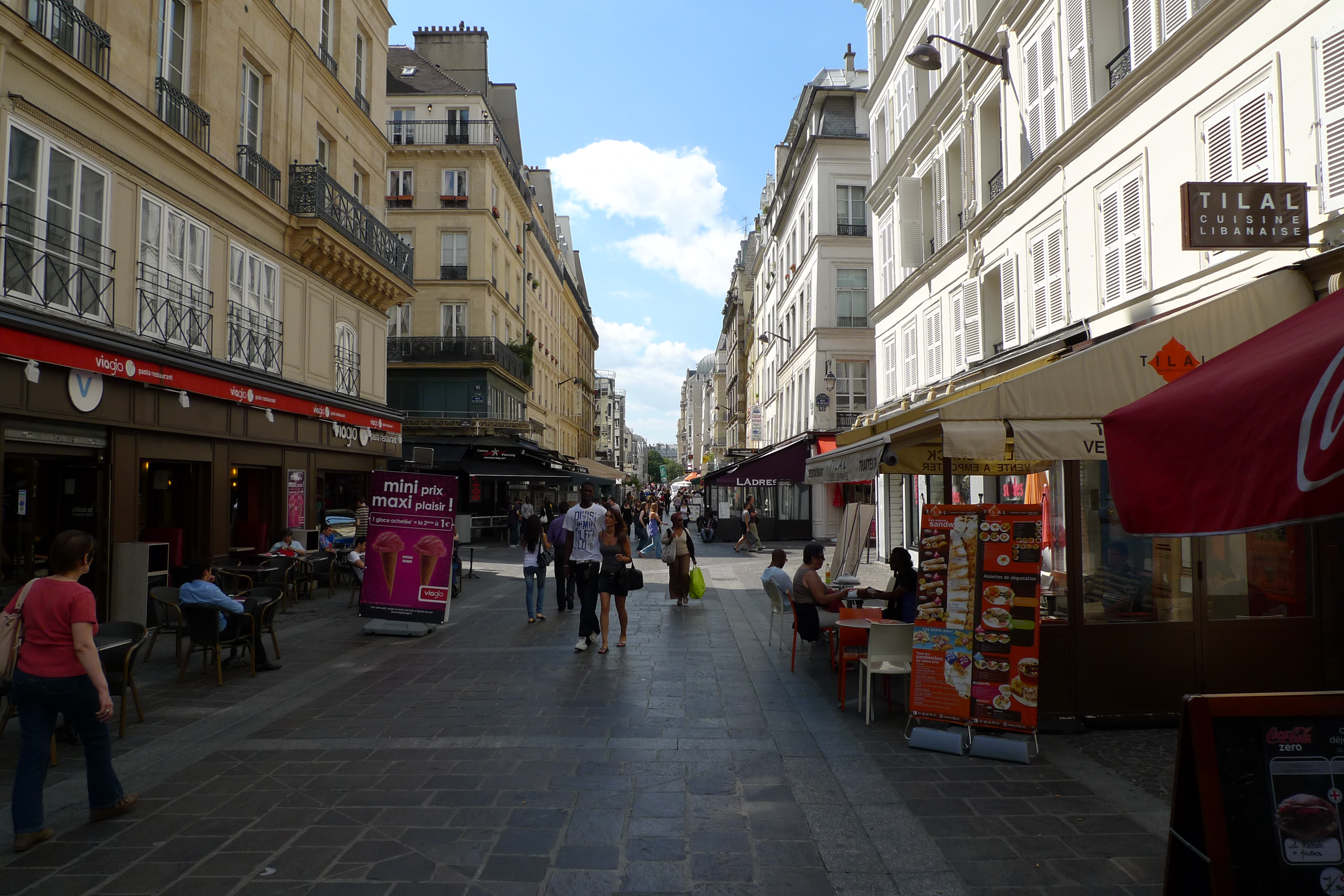 Rue Rambuteau, Paris.